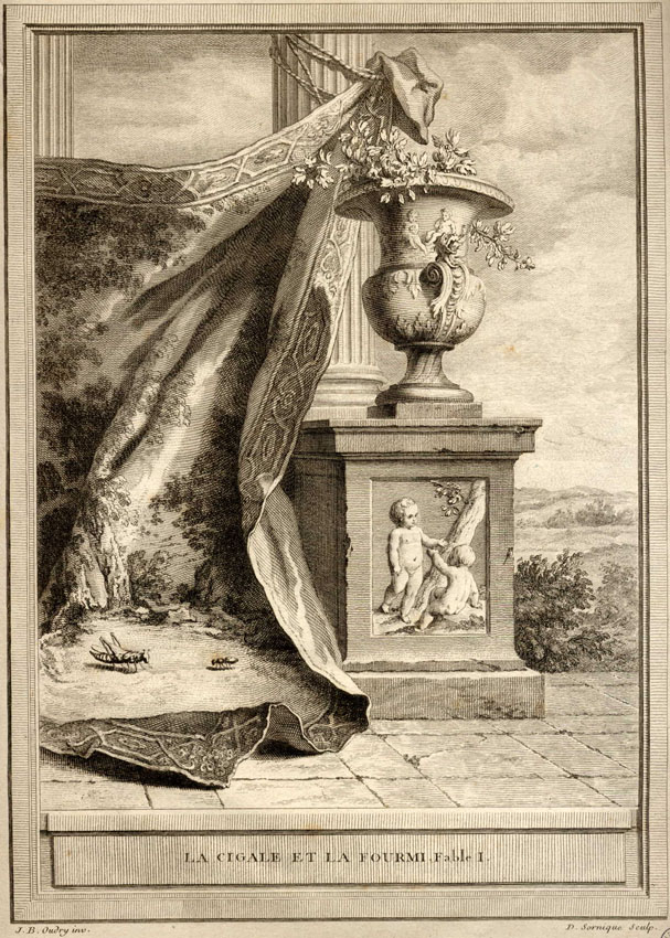 Illustration pour les Fables de la Fontaine. La Cigale et la Fourmi.